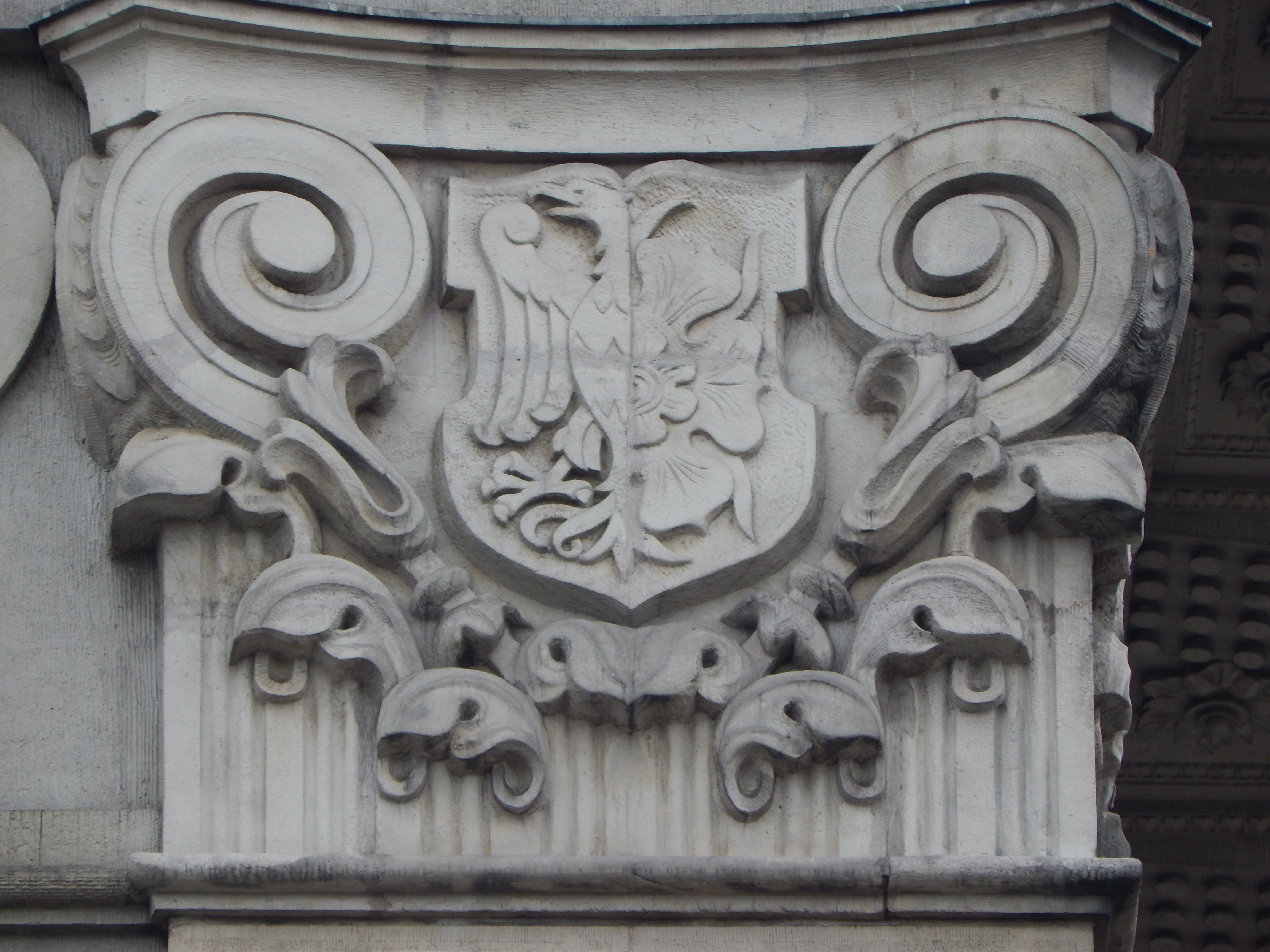 Fragment elewacji gmachu Sejmu Śląskiego - herb Wodzisławia